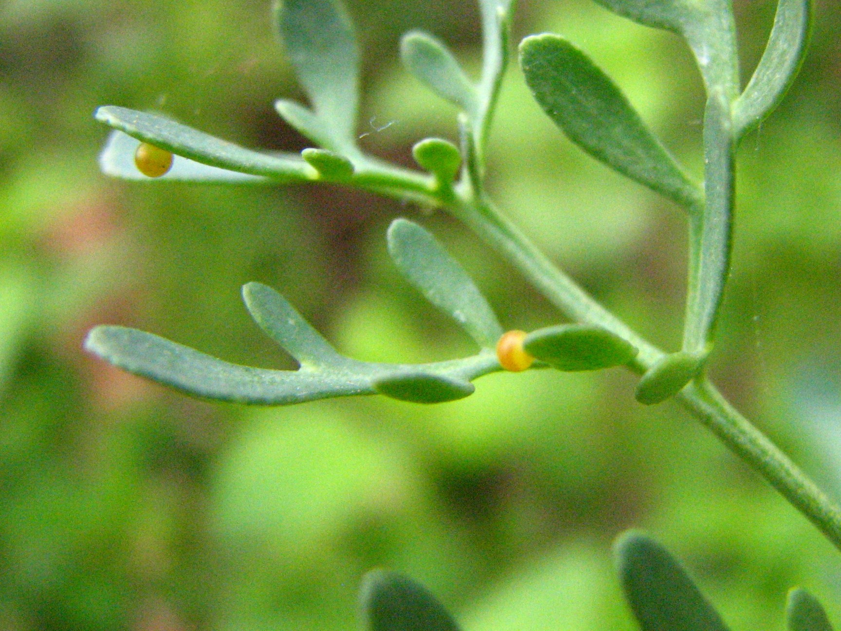 Papilio machaon's eggs on rue leaves